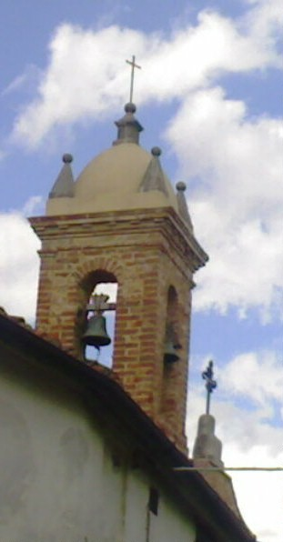 Campanile Chiesa della Compagnia Santa Croce Farnetella (Siena)